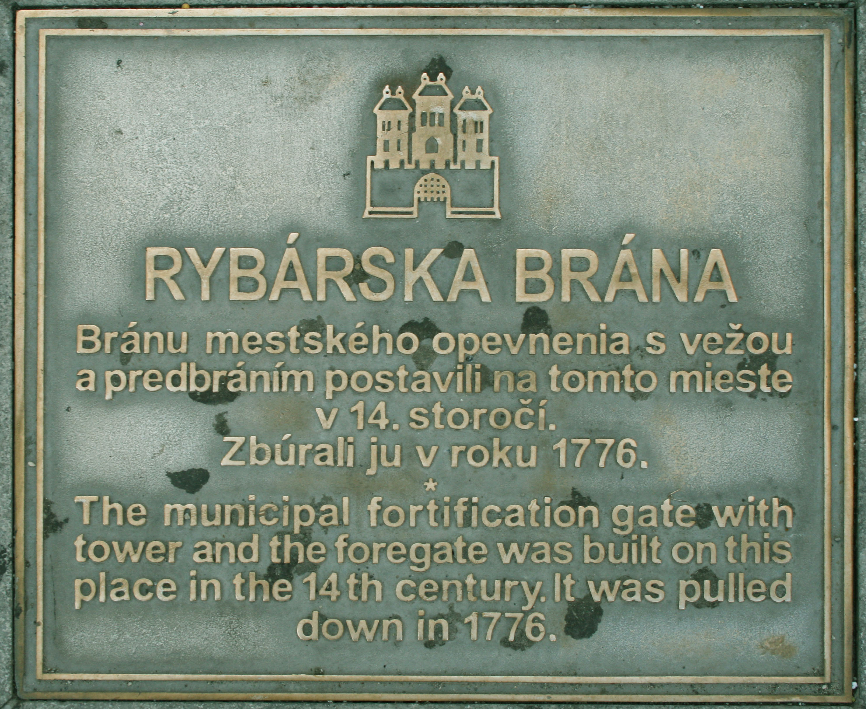 Tabuľa na chodníku informuje o historickej objekte